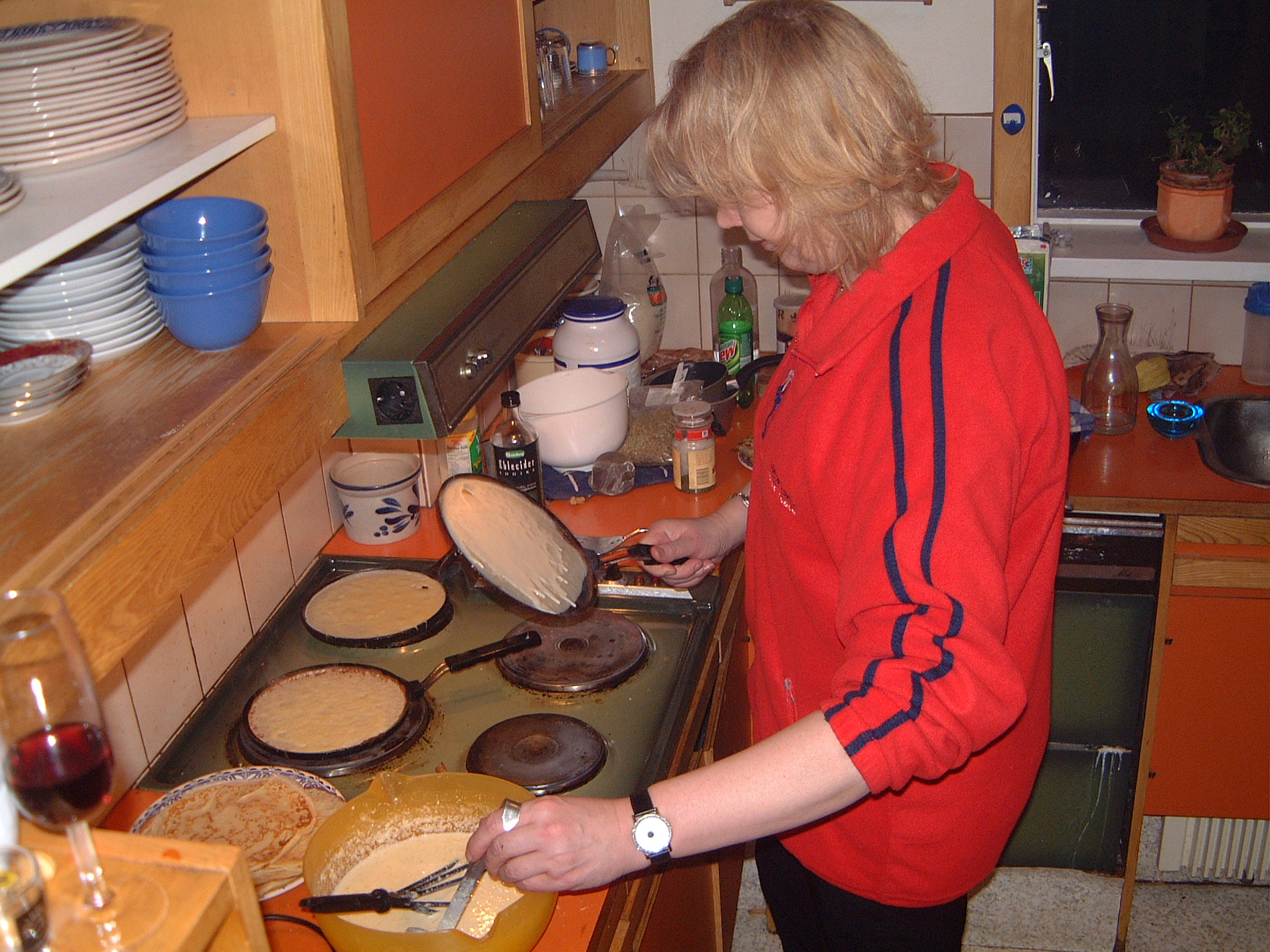 Pönnukökubakstur, Hallgerður Gísladóttir bakar á þremur pönnum